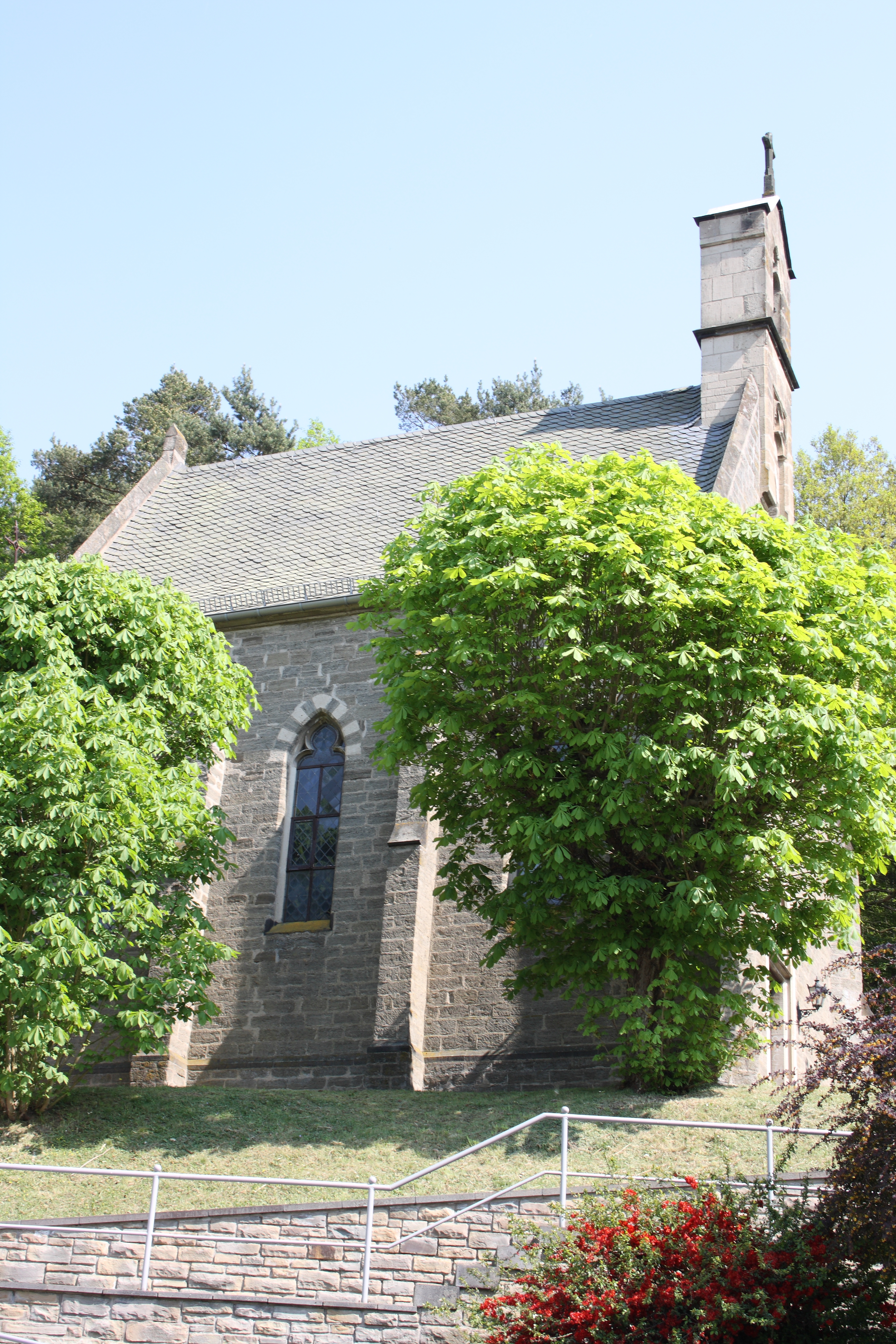 katholische Kapelle St. Silvester in Brenk